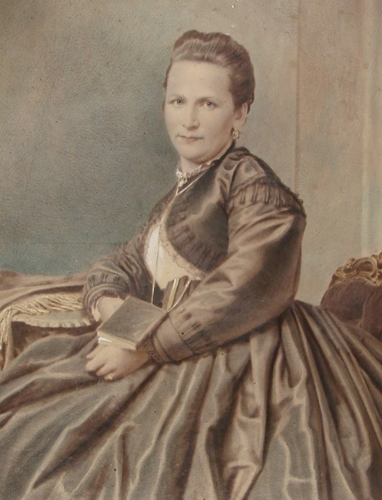 Księżna Maria Sułkowska z domu Gemperle, fotografia podkolorowywana, lata 60. XIX w. (ze zbiorów i za zgodą rodzinnych baronów Unterrichter von Rechtenthal w Sarns koło Brixen)